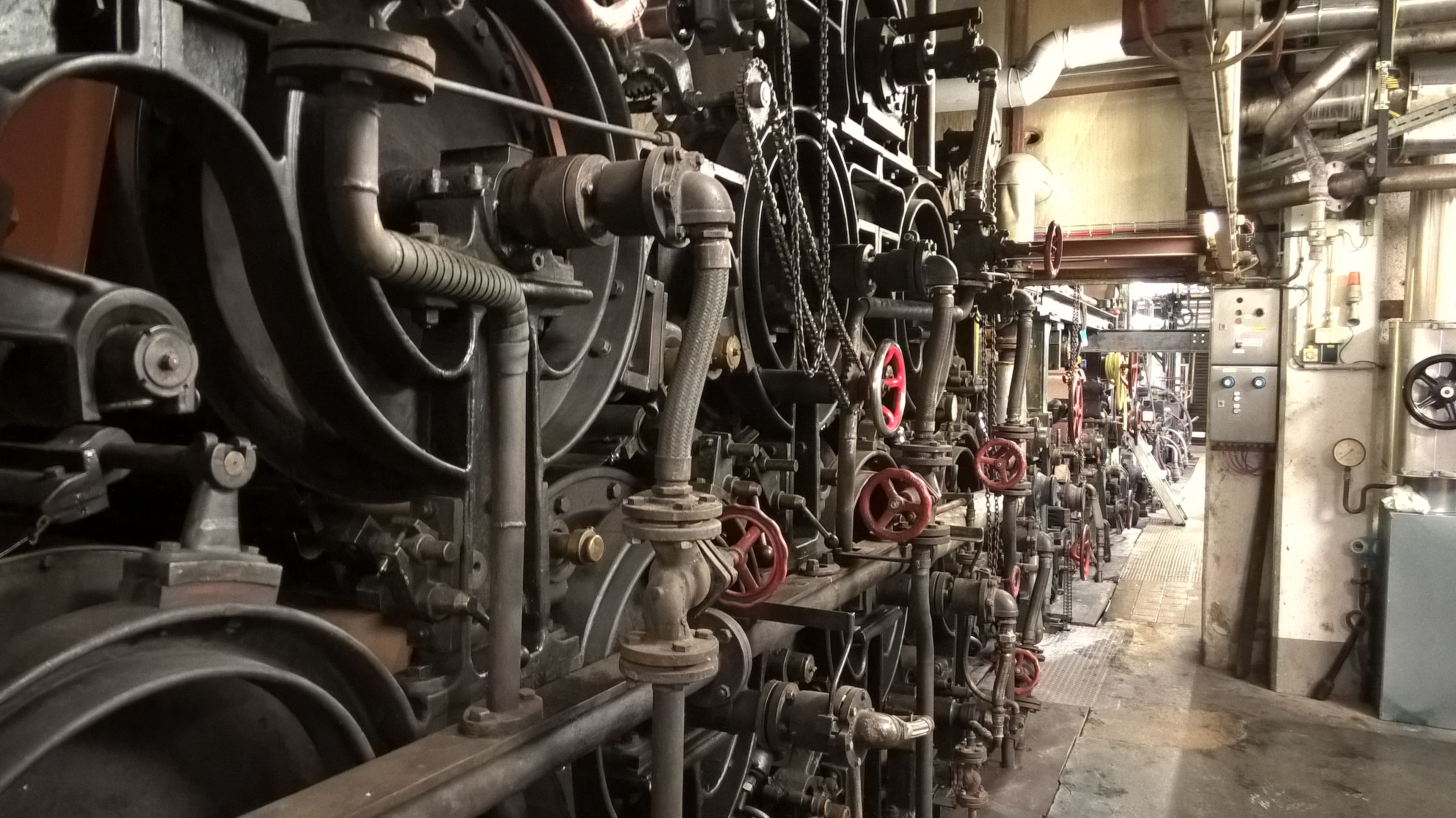 Papiermaschine aus dem Jahr 1886 zur Herstellung von Büttenpapier. Noch im Betrieb in der Büttenpapierfabrik Gmund